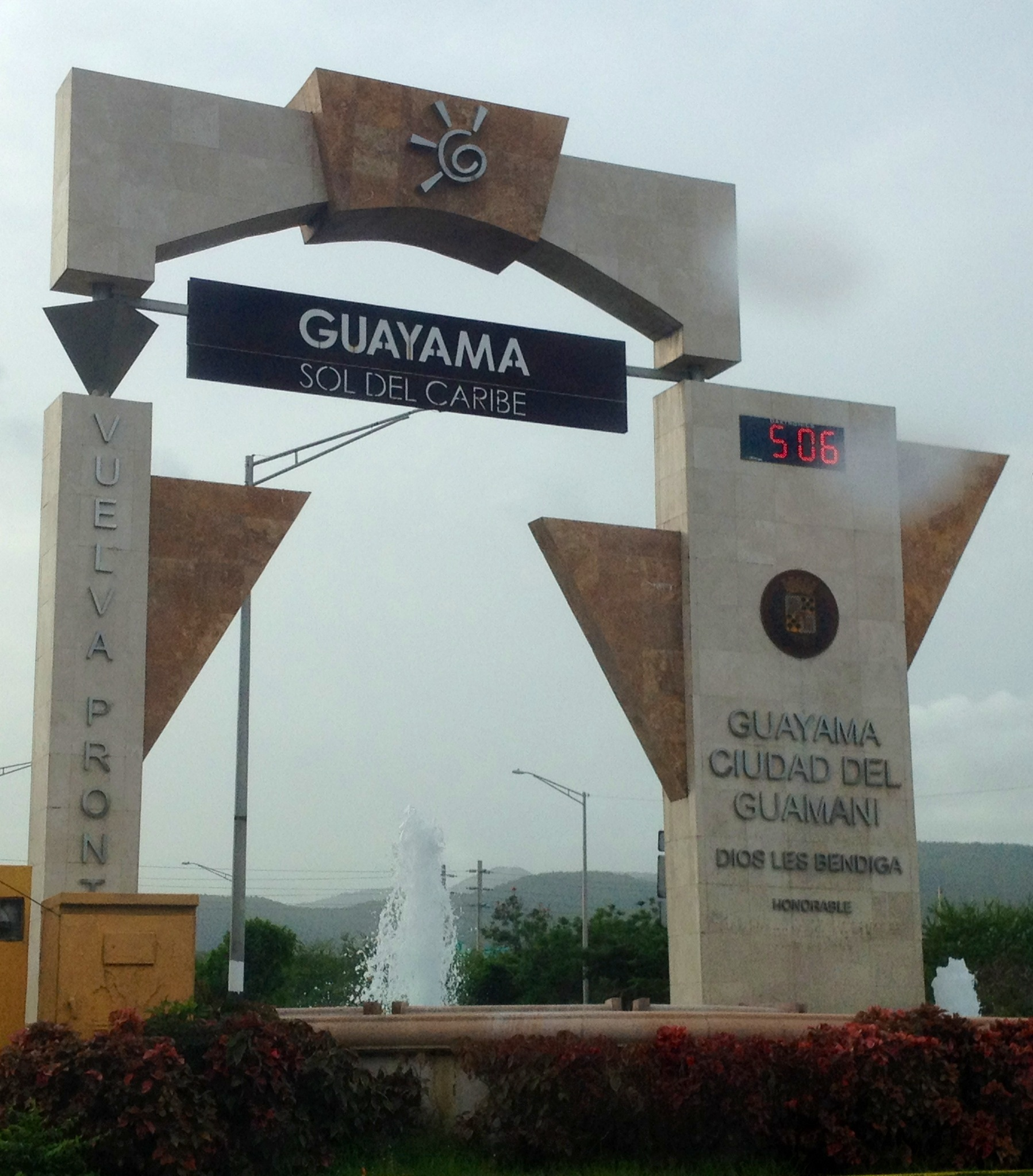 PR-54 Entrada a Guayama